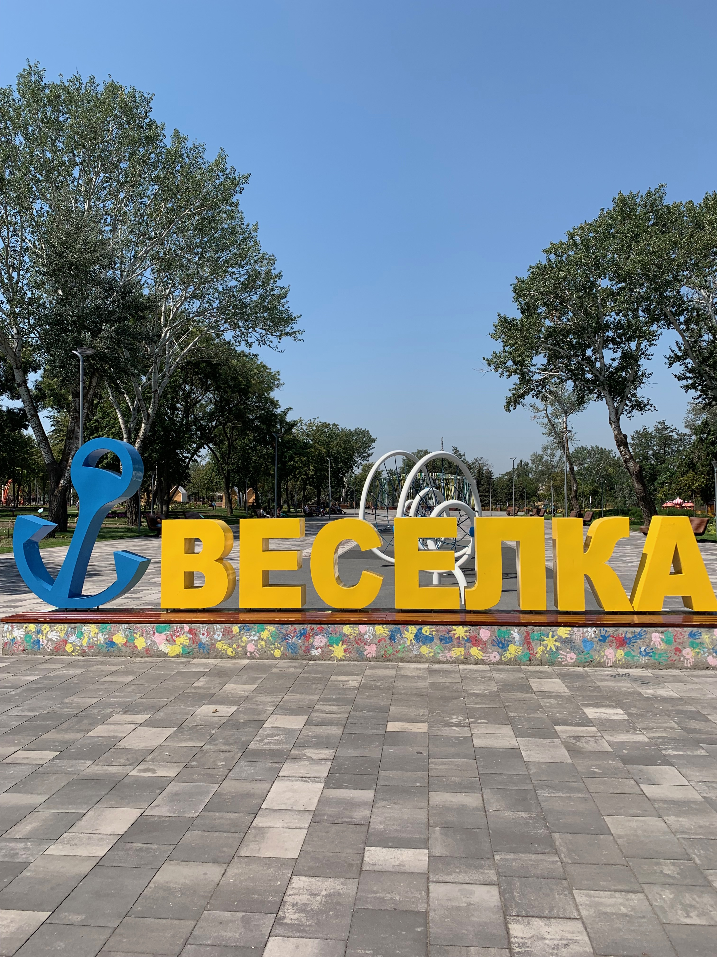 Вхід у парк "Веселка" у Маріуполі